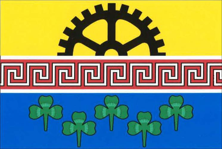 vlajka, Velký Šenov, okres Děčín